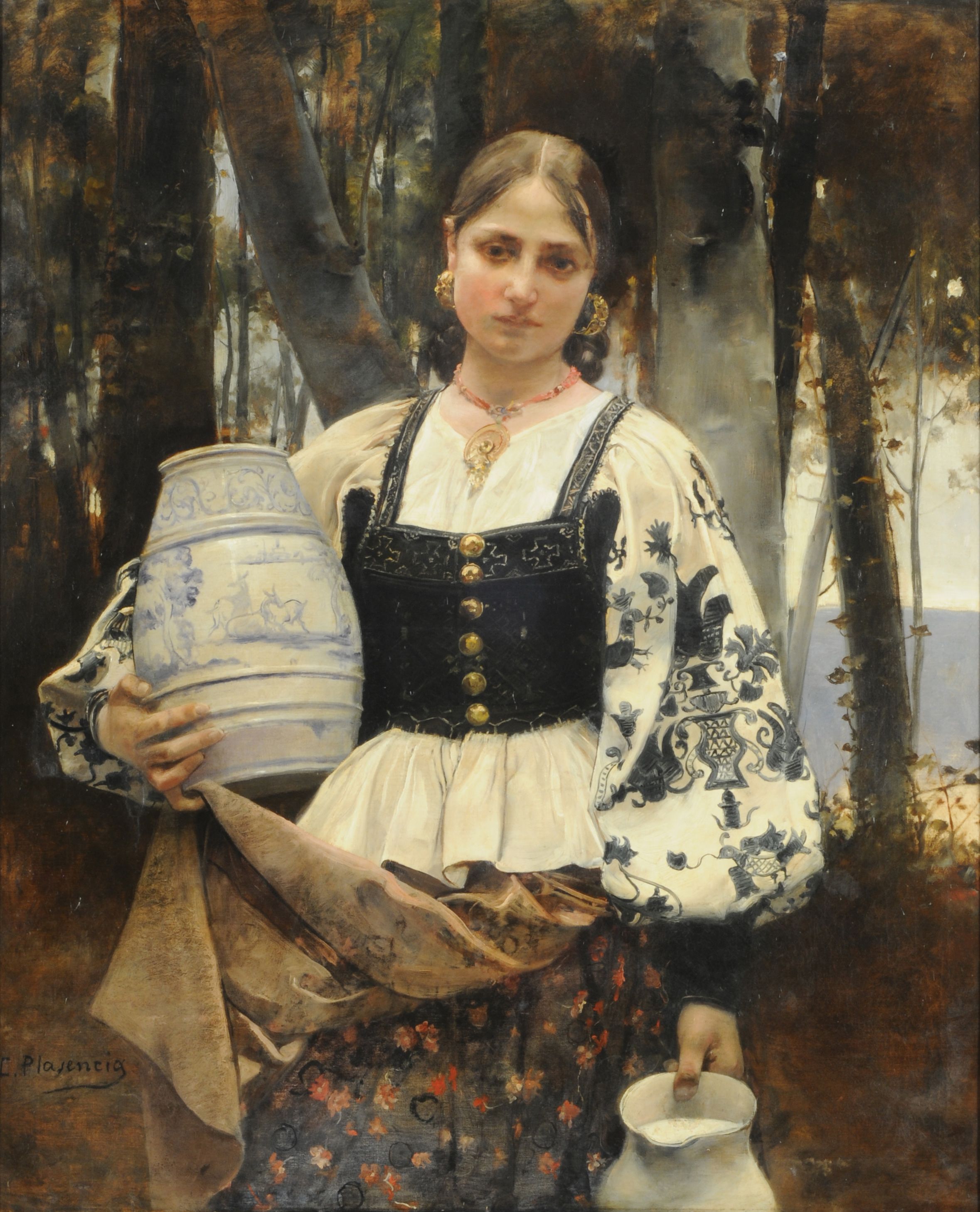 La lechera.